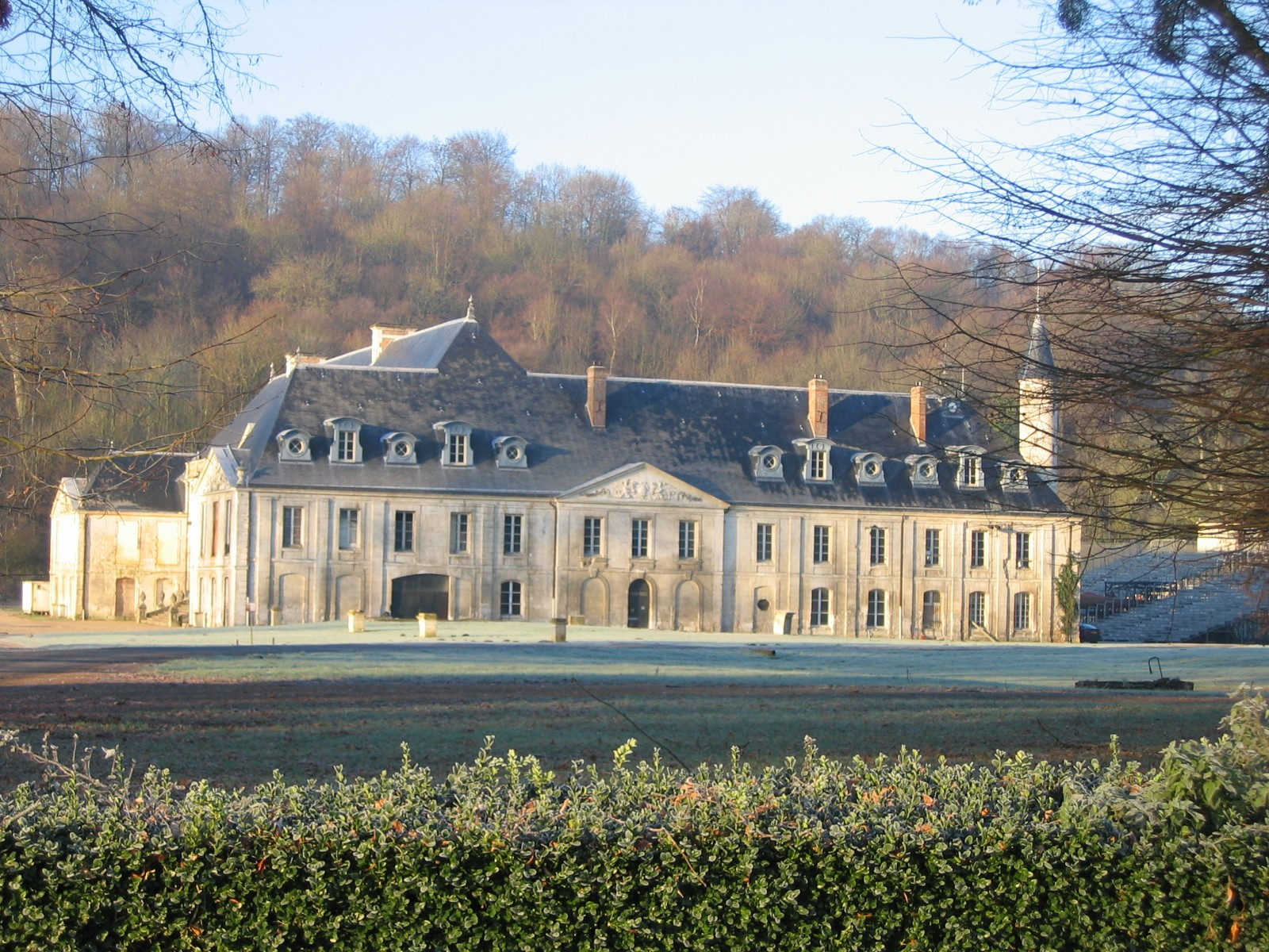 Abbaye de Gruchet-le-Valasse, en Seine-Maritime, Haute-Normandie/ Photographie personnelle, prise en décembre 2004, par l'utilisateur Urban/ GFDL